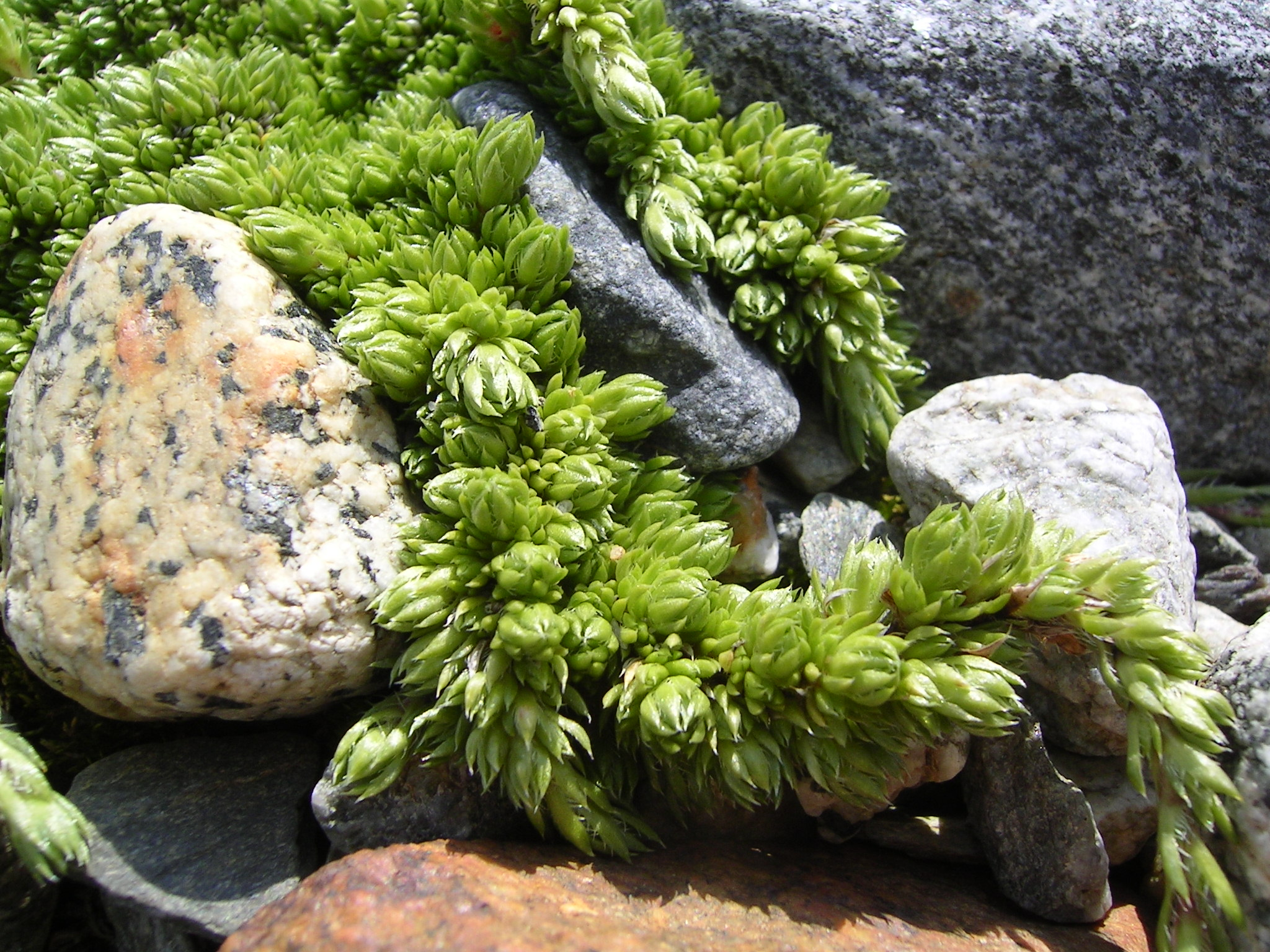 (en) Maybe Saxifraga bryoides (de) Vielleicht Moos-Steinbrech (Saxifraga bryoides) Place/Ort: Meiringen, Berner Oberland, CH. Unterhalb des Rhônegletschers im Dorf.